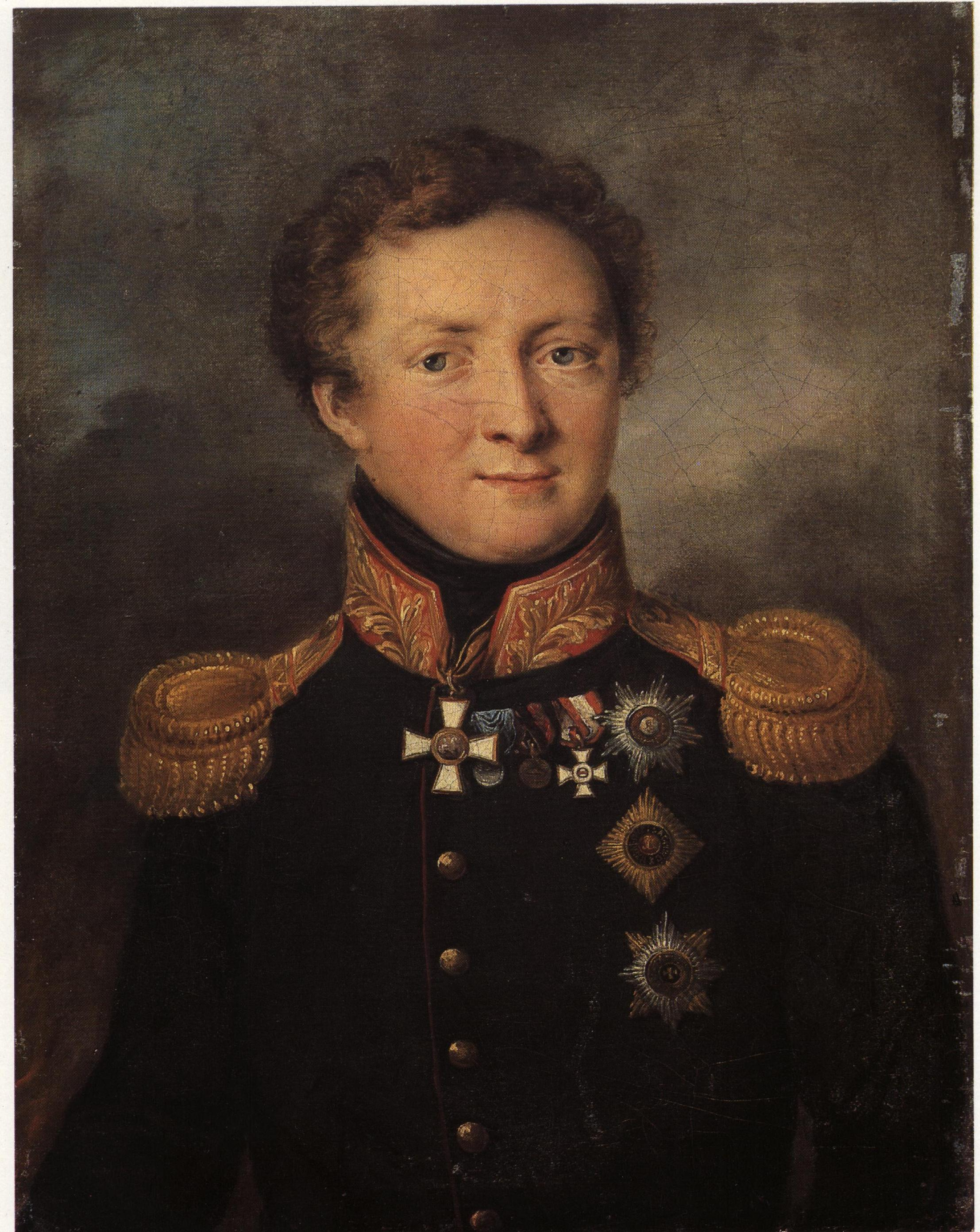 Портрет генерала Андрея Ивановича Горчакова. 1810-е